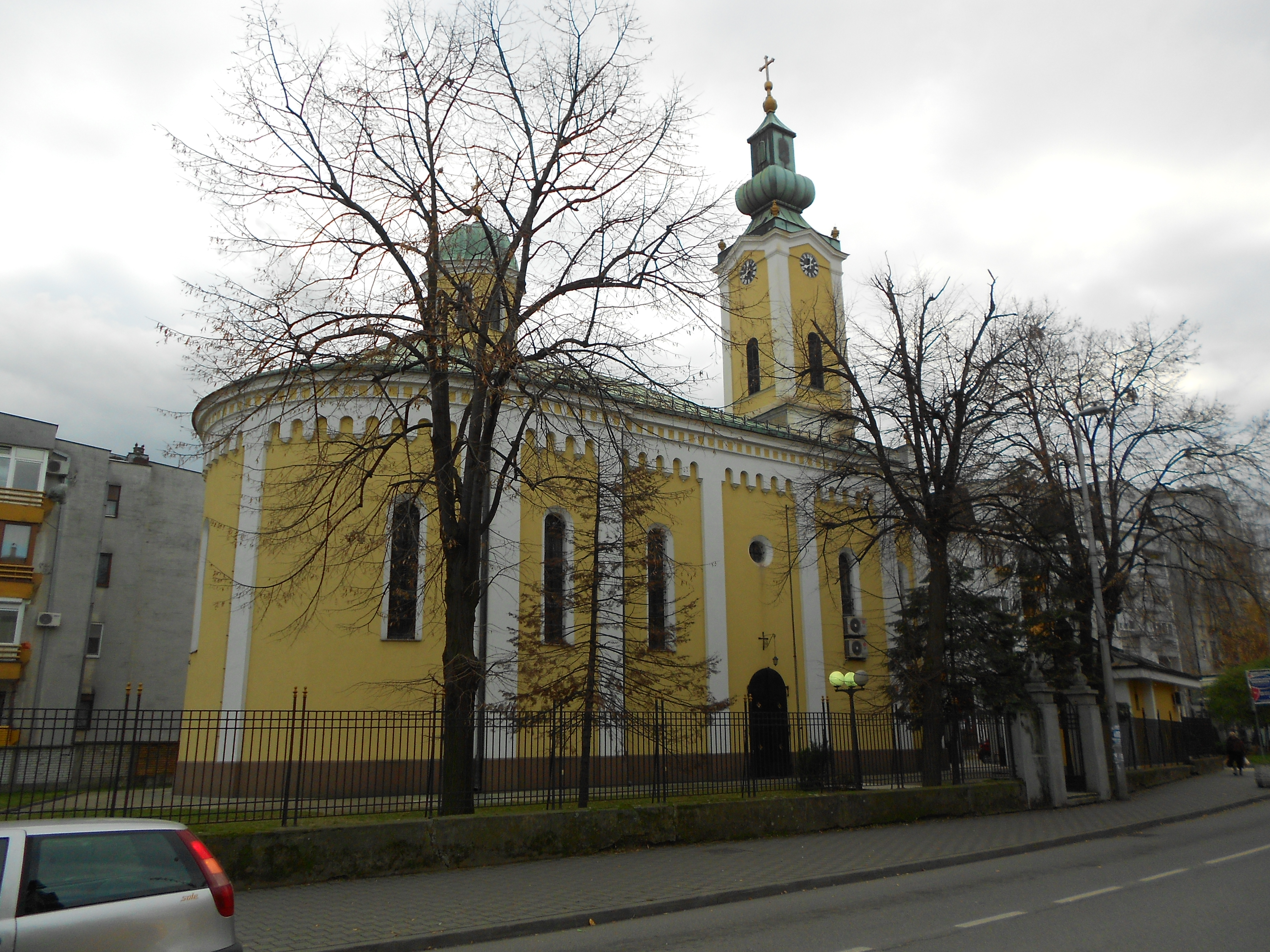 Црква Светог Георгија у Бијељини